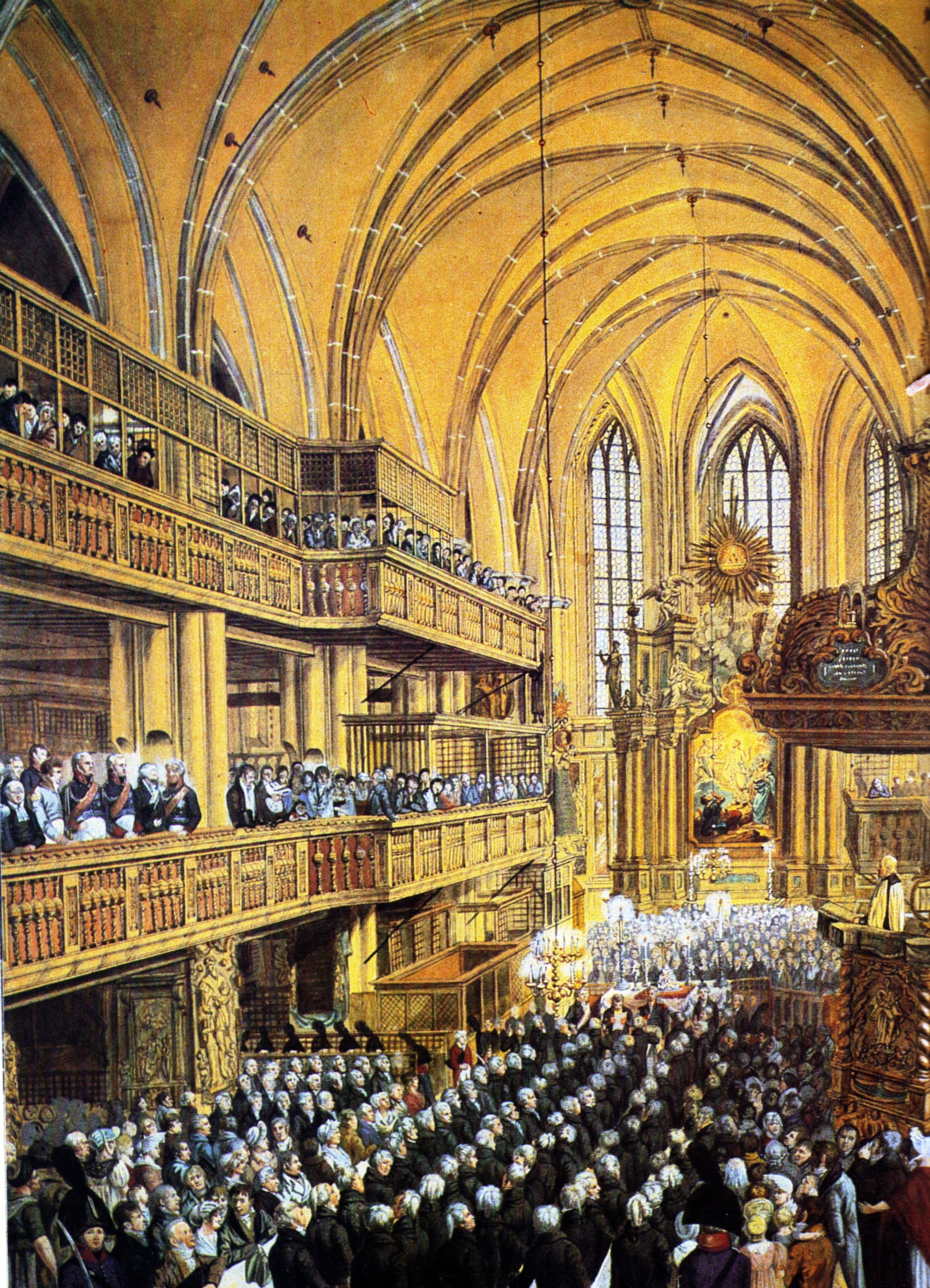 Erste preußische Stadtverordnete (1808)